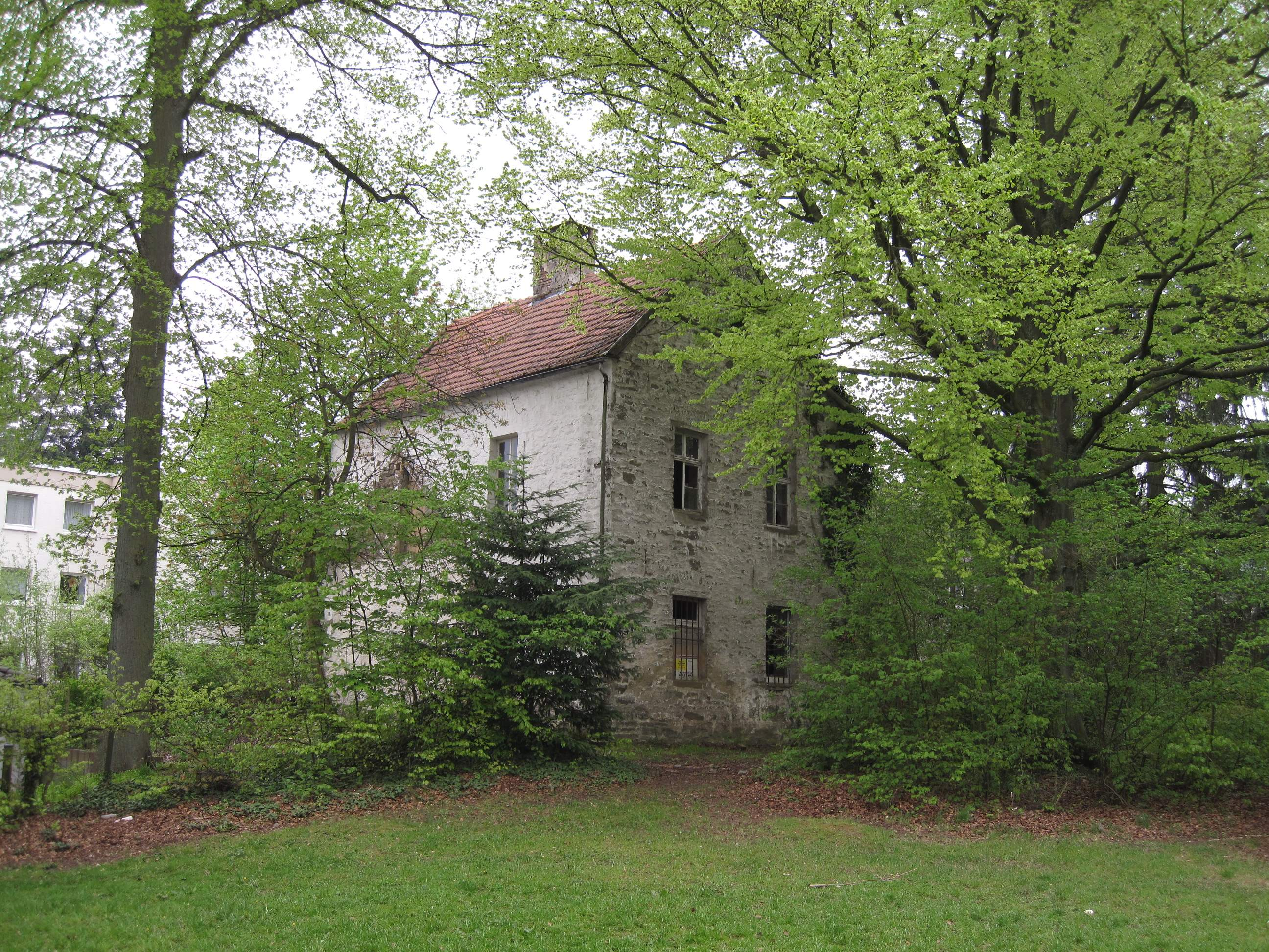 Unter Denkmalschutz stehendes Gebäude der ehemaligen „Burgstelle Werminghausen“ (Stammsitz der Edelherren von Werminghausen) in Iserlohn-Wermingsen. Denkmalschutz seit 14. Juni 1996. Turmartiger Rechteckbau, 2 x 2 Fensterachsen, spätes Mittelalter. Teil einer Wasseranlage am Wermingser Bach. Großer Kaminblock mit zwei Kammern. This image shows a heritage building in Germany, located in the North Rhine-Westphalian city Iserlohn (no. 198).